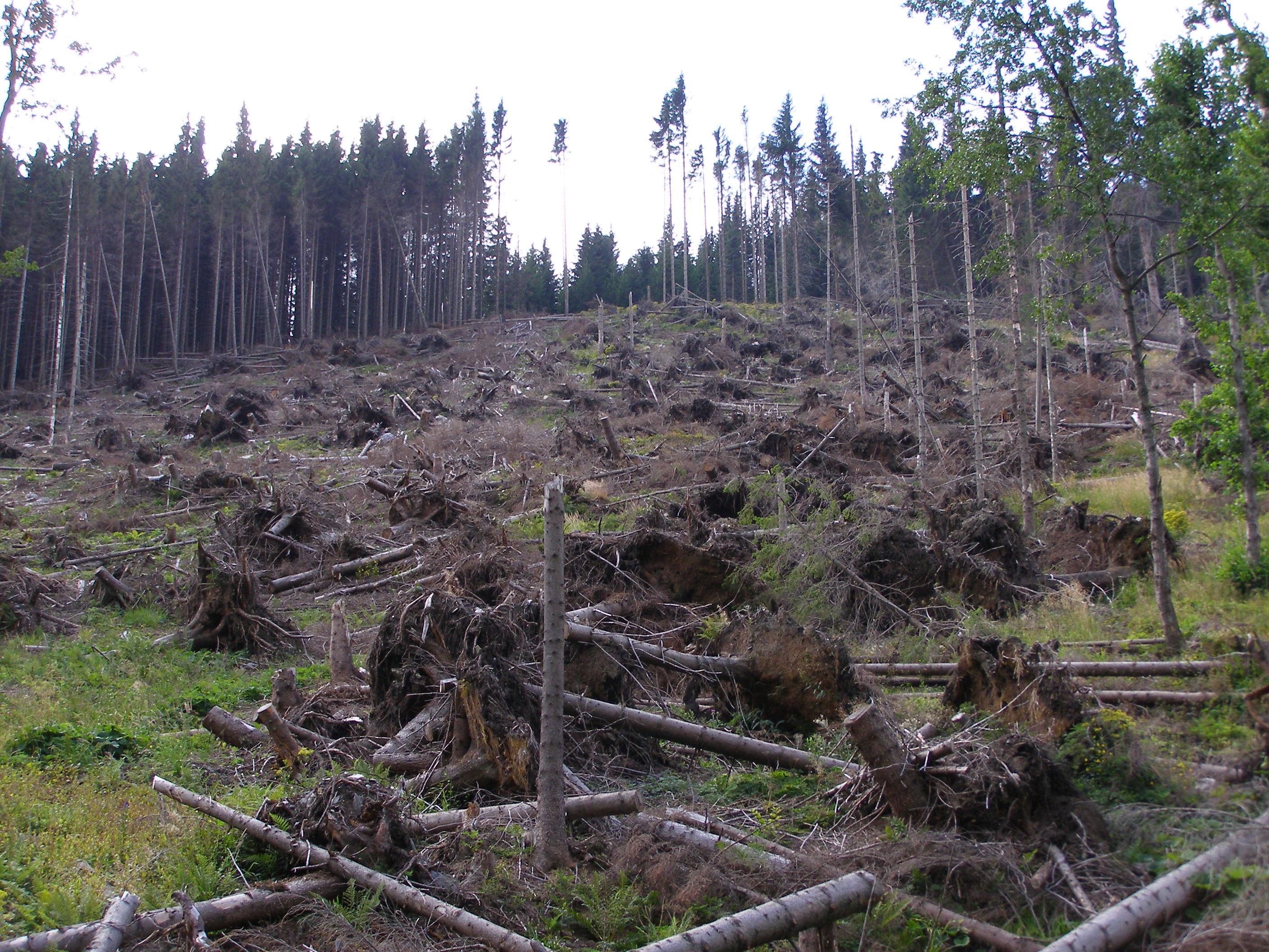 polom po vichřici